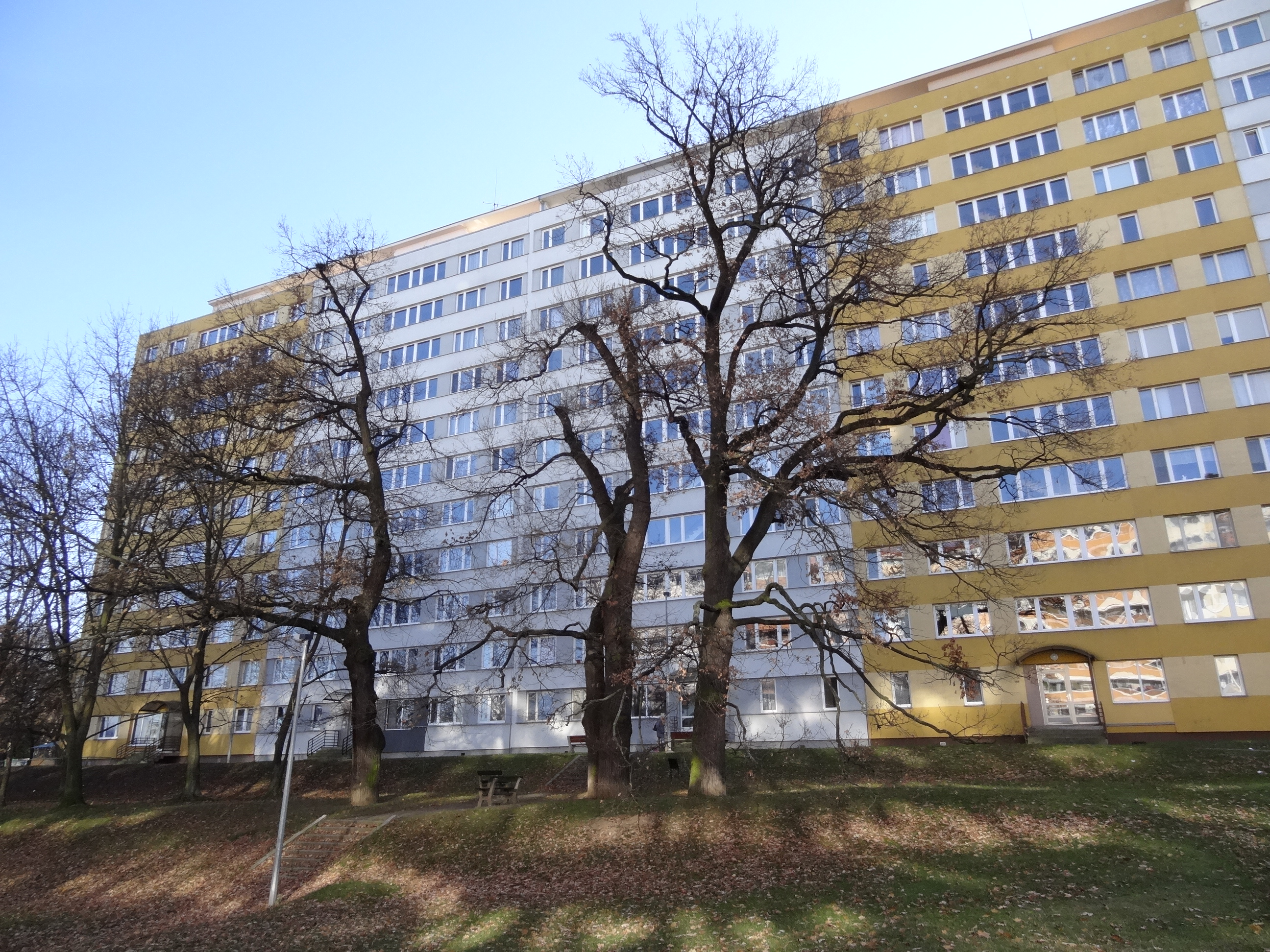 Krč - skupina památných dubů letních ve Sládkovičově ulici